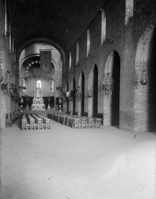 Imatge